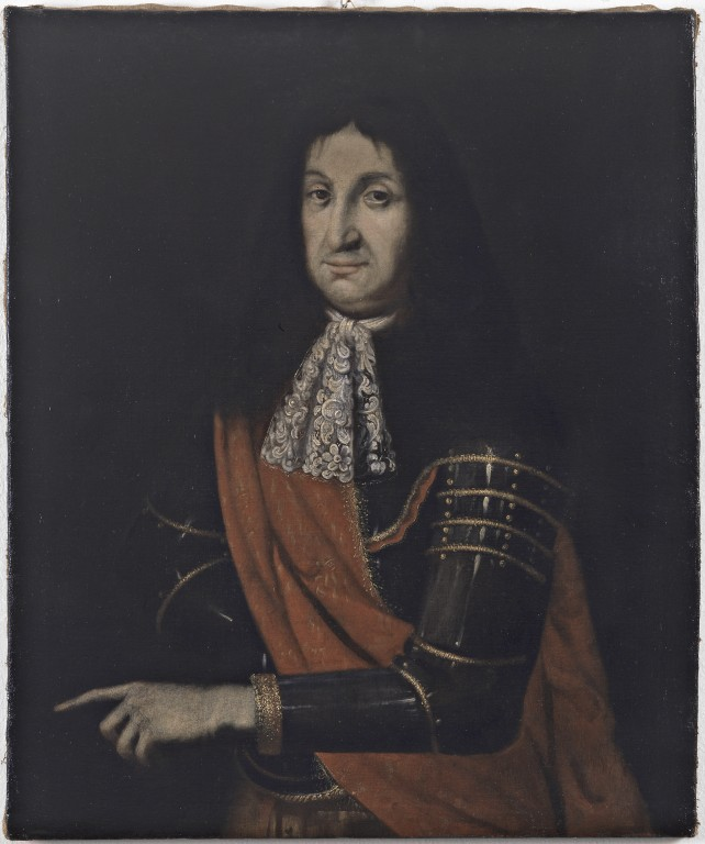 Ritratto di Alessandro II Pico penultimo duca di Mirandola